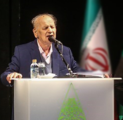 ابوالحسن خوشرو در مراسم اختتامیه جشنواره موسیقی آینه دار ۱۳ آذر ۱۳۹۷ تالار وحدت تهران